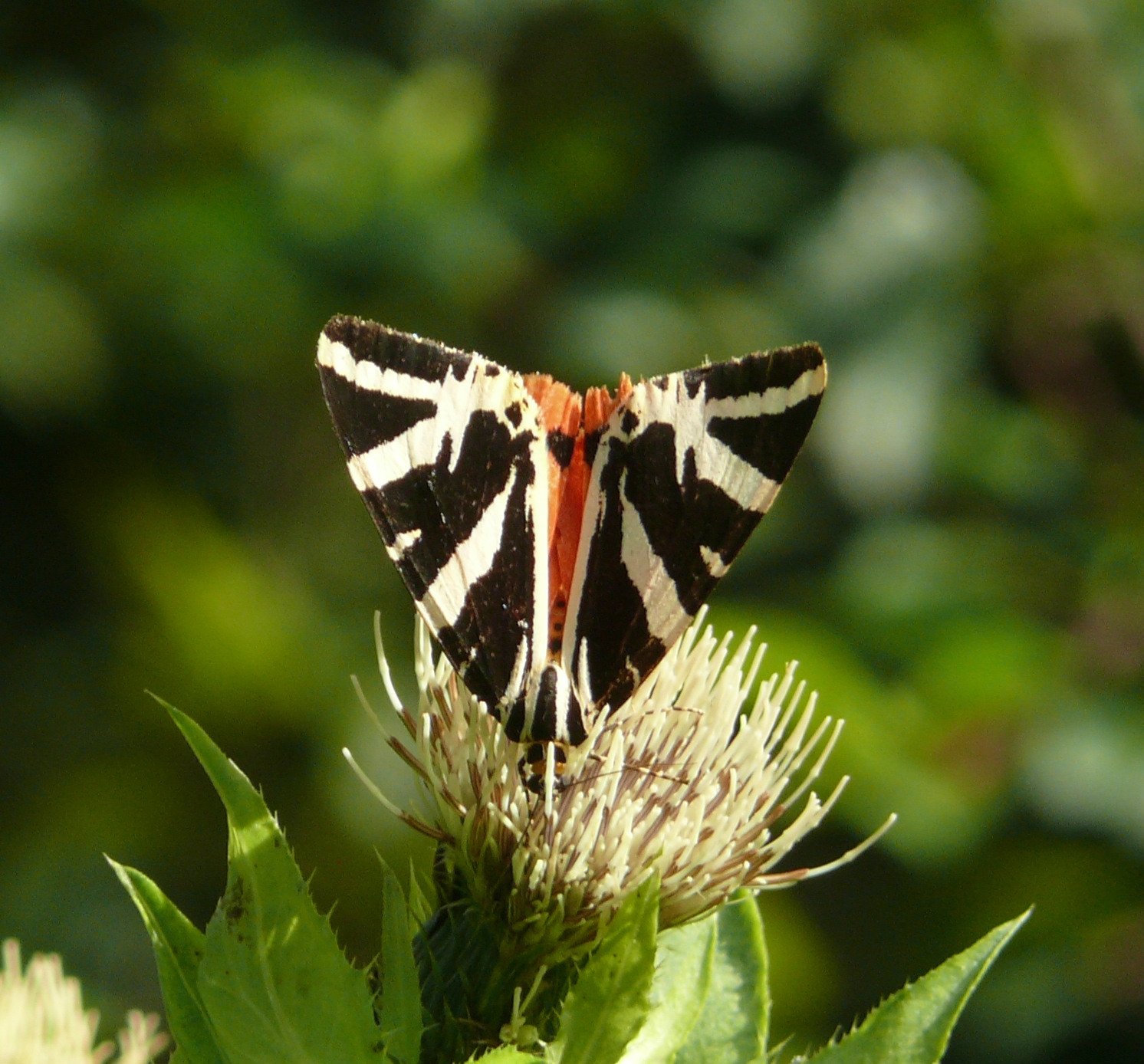 Euplagia quadripunctaria, Hohenlohe, Deutschland